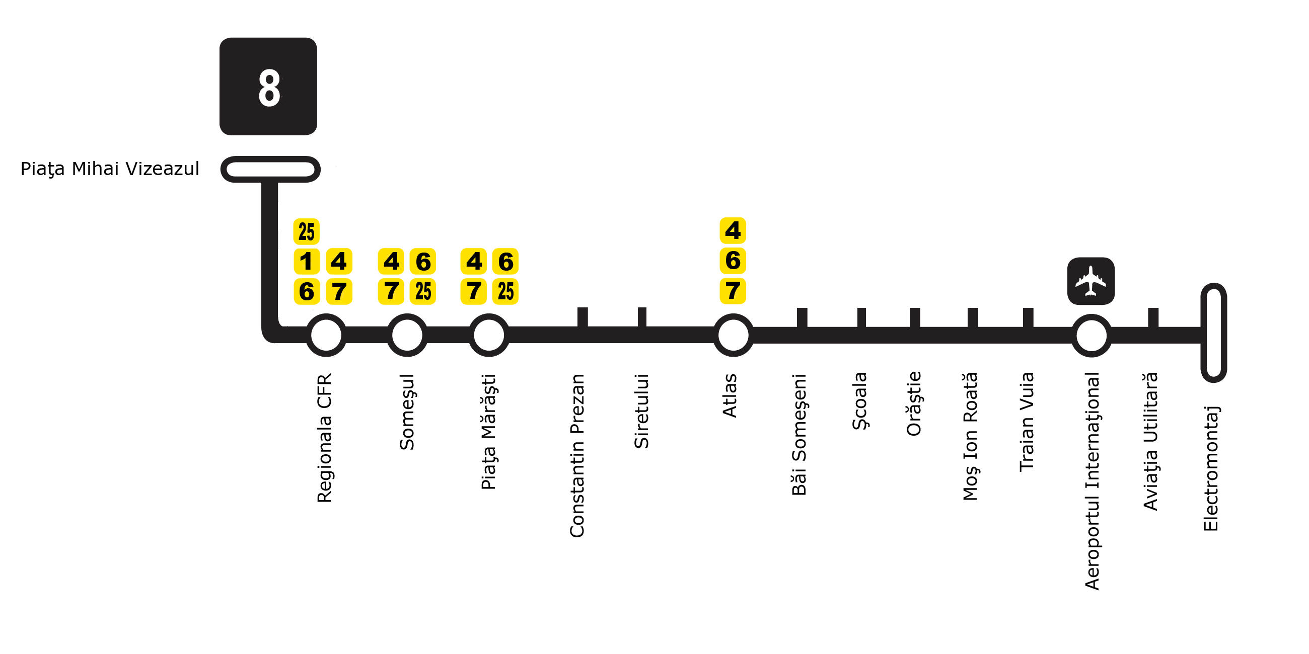 Ruta 8 a Companiei clujene de transport public (RATUC)